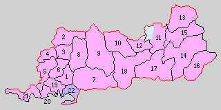 愛媛県東宇和郡の町村制時点の町村。